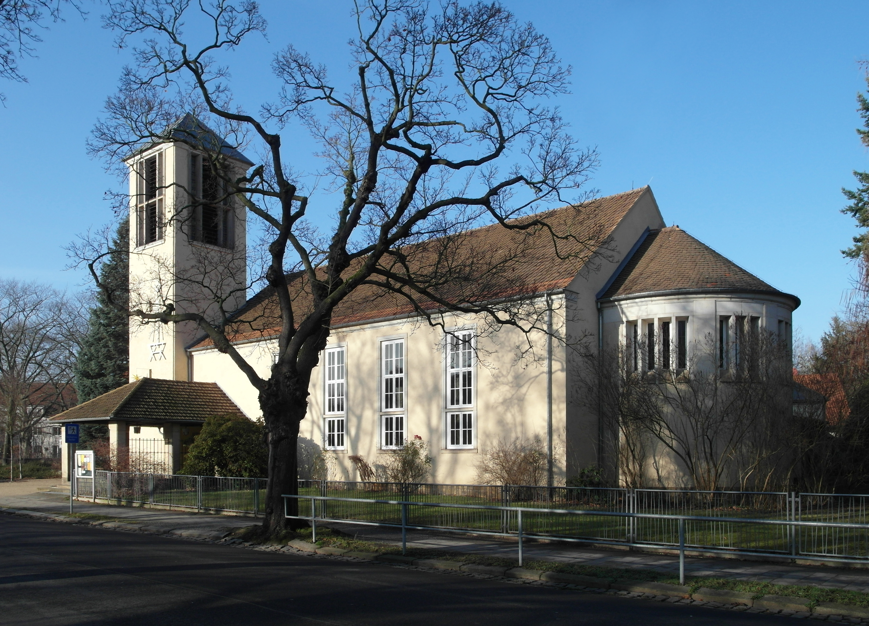 11.01.2018 01705 Dresden-Tolkewitz, Marienberger Straße 65 (GMP: 51.032102,13.822079): Evangelische Bethlehemkirche. Erbaut 1950/51 nach Plänen von Wolfgang Rauda mit einer Orgel der Firma Jehmlich aus Dresden. [SAM3473.JPG]20180111140DR.JPG(c)Blobelt